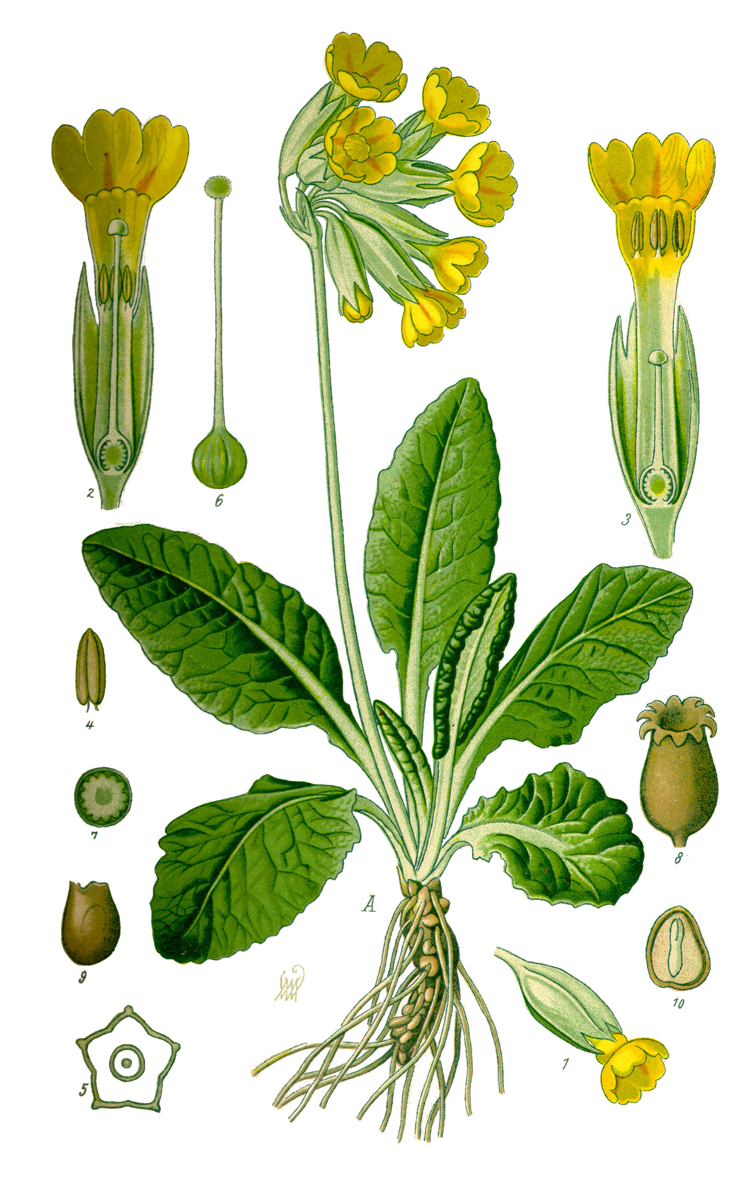 Name Primula veris Family Primulaceae